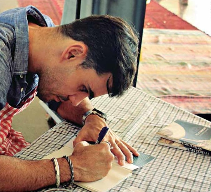 O ator e escritor brasileiro Juliano Cazarré em tarde de autógrafo de seu livro de poesias (Brasília).